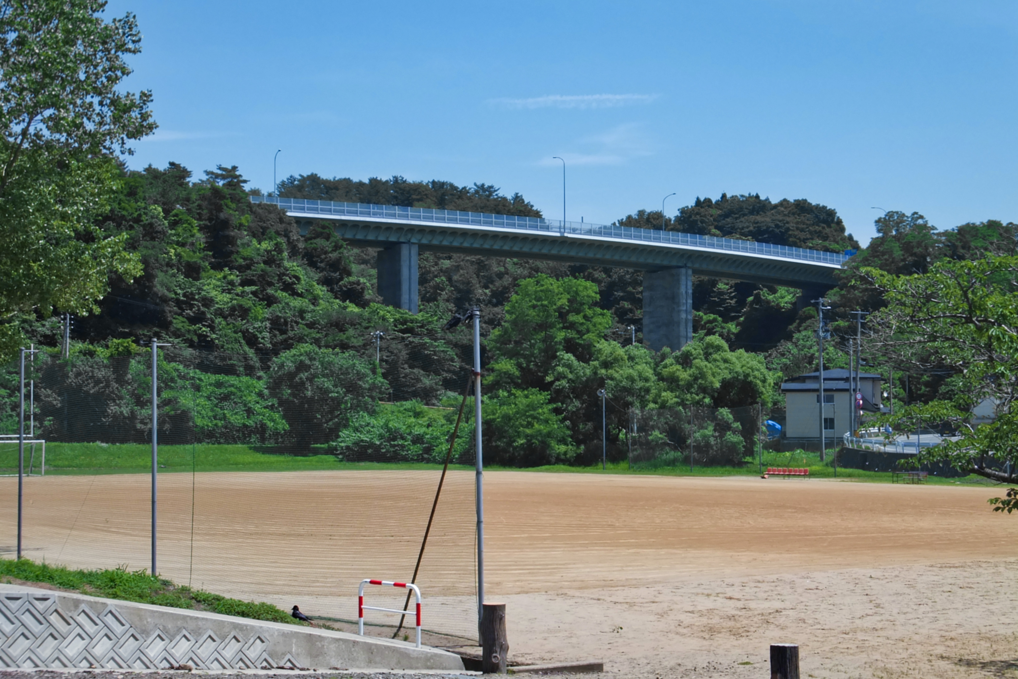 秋田県道41号秋田昭和線（都市計画道路横山金足線）、手形山大橋。秋田高校グラウンド付近より